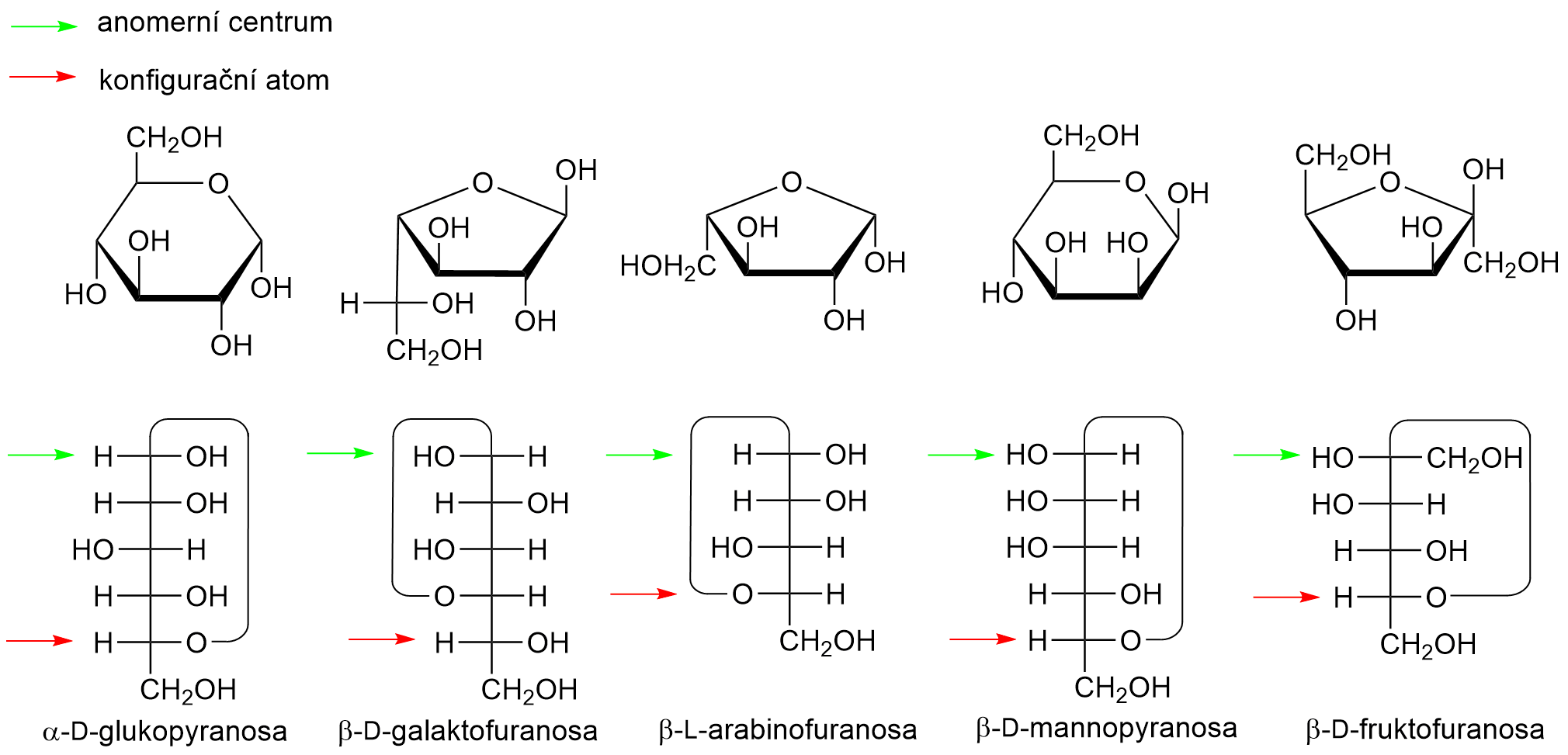 Příklady monosacharidů pro přiřazení anomerních referenčních symbolů.